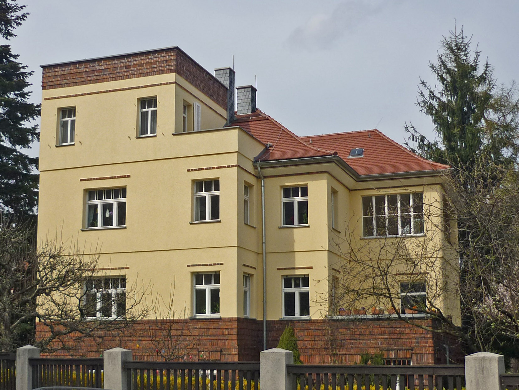 Leonhard-Frank-Str. 4 in Dresden-Südvorstadt